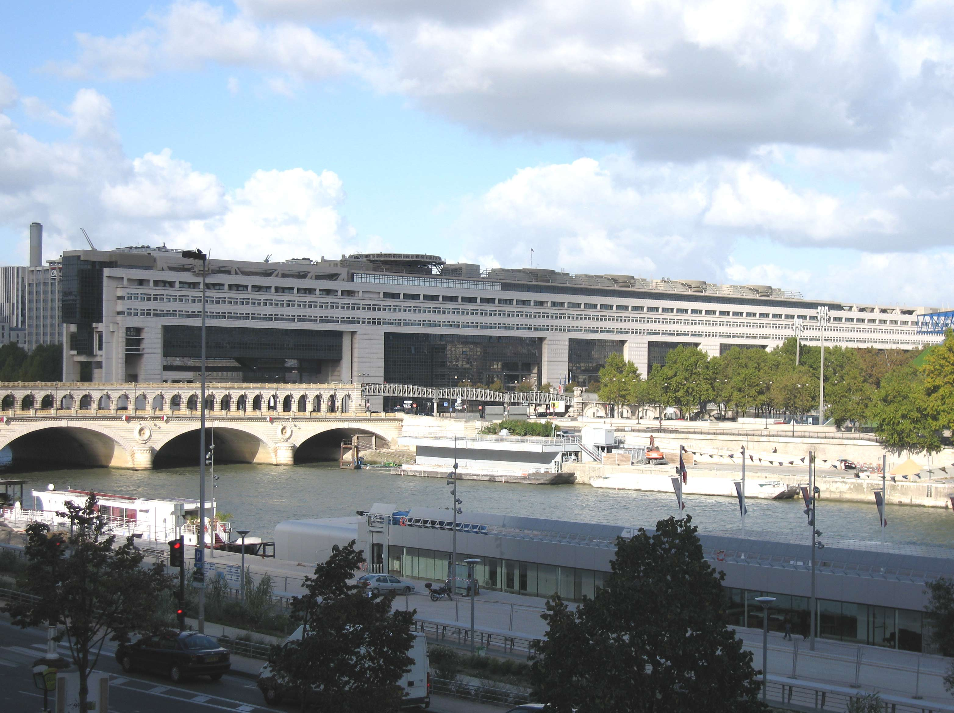 Viaduc et Palais Omnisports de Bercy, Paris, France